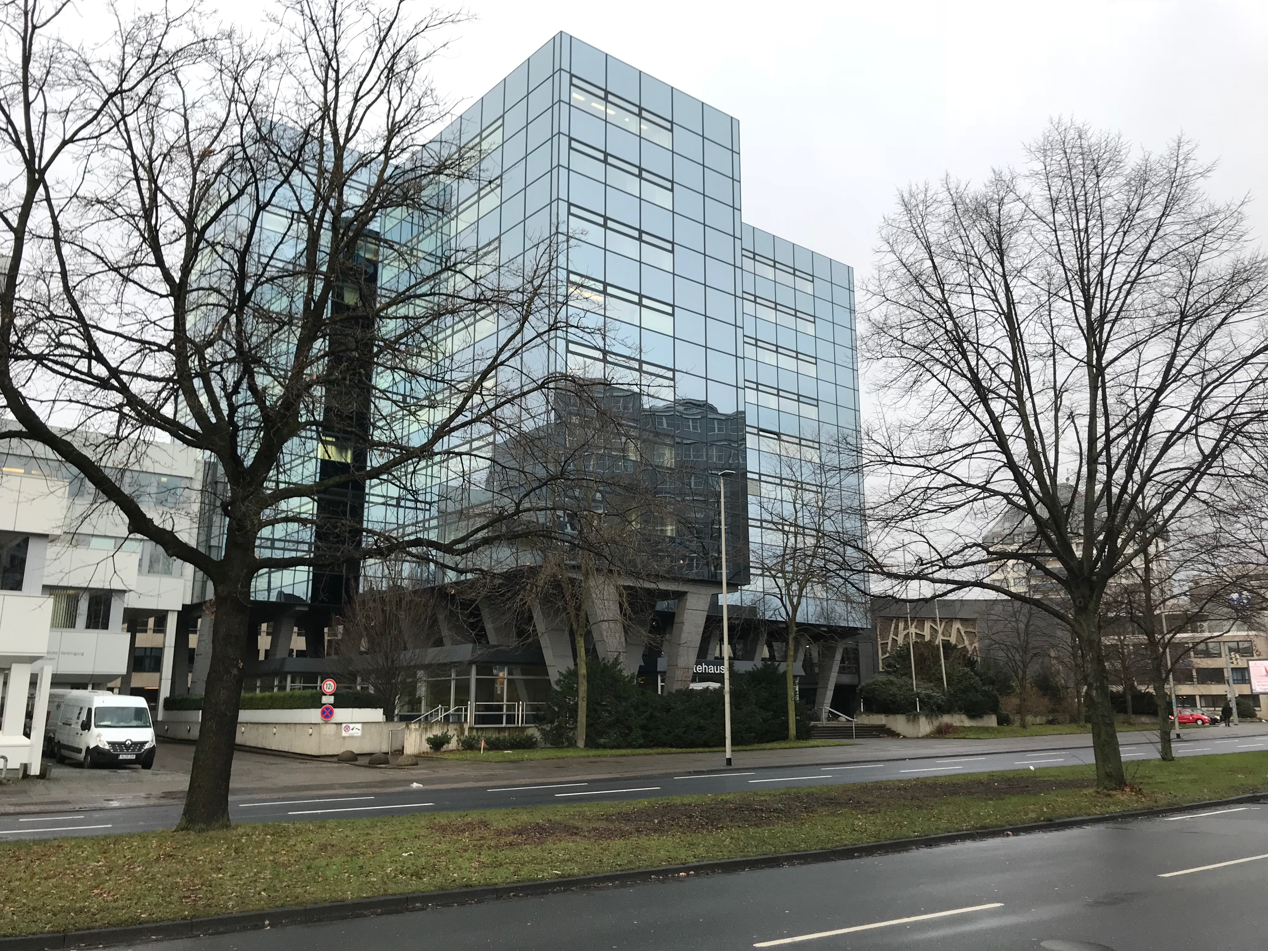 Ehemaliges Haus der Ärztekammer Niedersachsen im Herbst 2017 unmittelbar vor dem Abriss - rechts neben dem Haupthaus der große Sitzungssaal - im Volksmund Schildkröte genannt